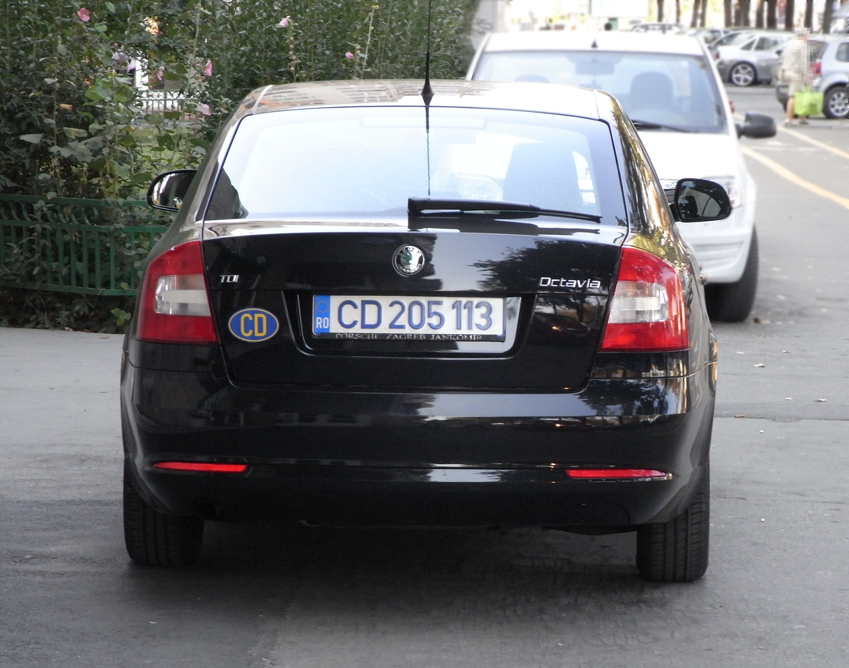 Auto mit rumänischem Diplomatenkennzeichen in Bukarest